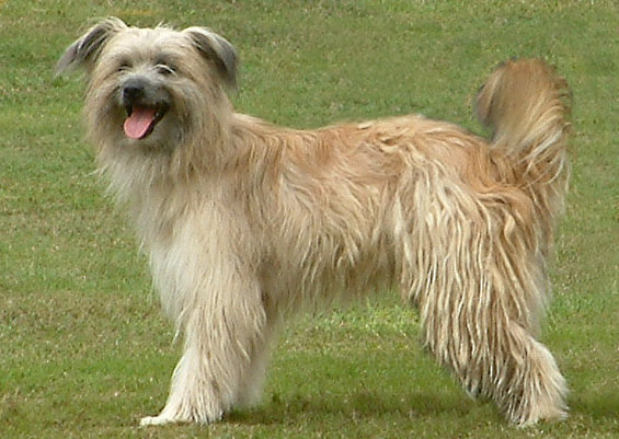 Berger des Pyrénées: Adeux de la petite Noire, world champion 2003 Foto selbst erstellt